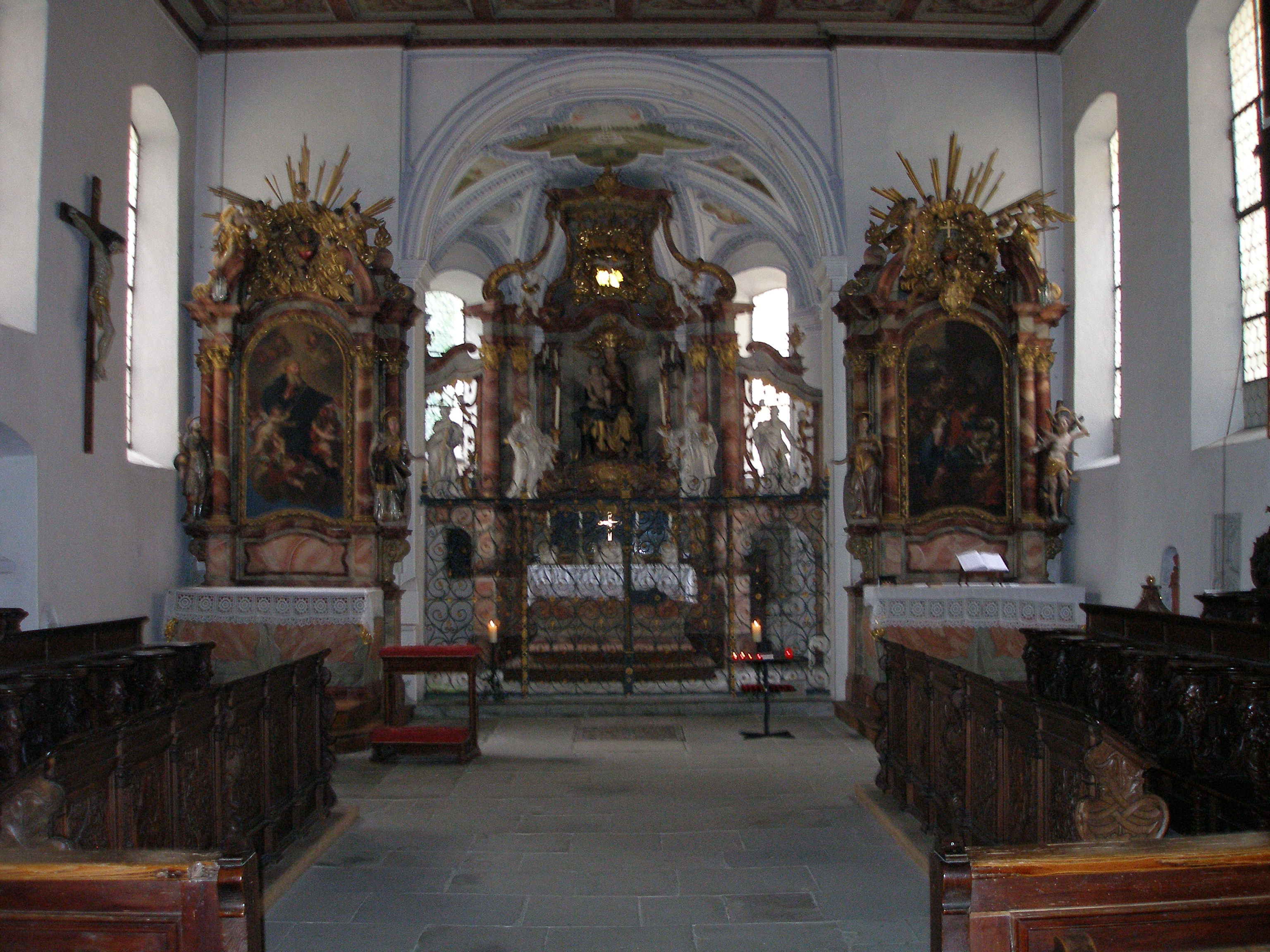 Pfarrkirche St. Georg und Jakobus (Isny)